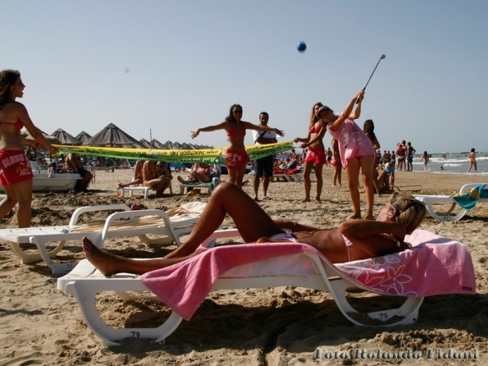 Publika je aktivni deo igre